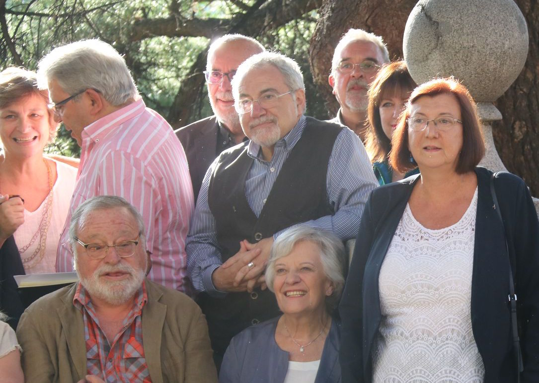 Con Fernando Savater, Victoria Camps, Concha Roldán, Ana Romero, Paco Alvarez, Carlos Thiebaut y Salvador Mas